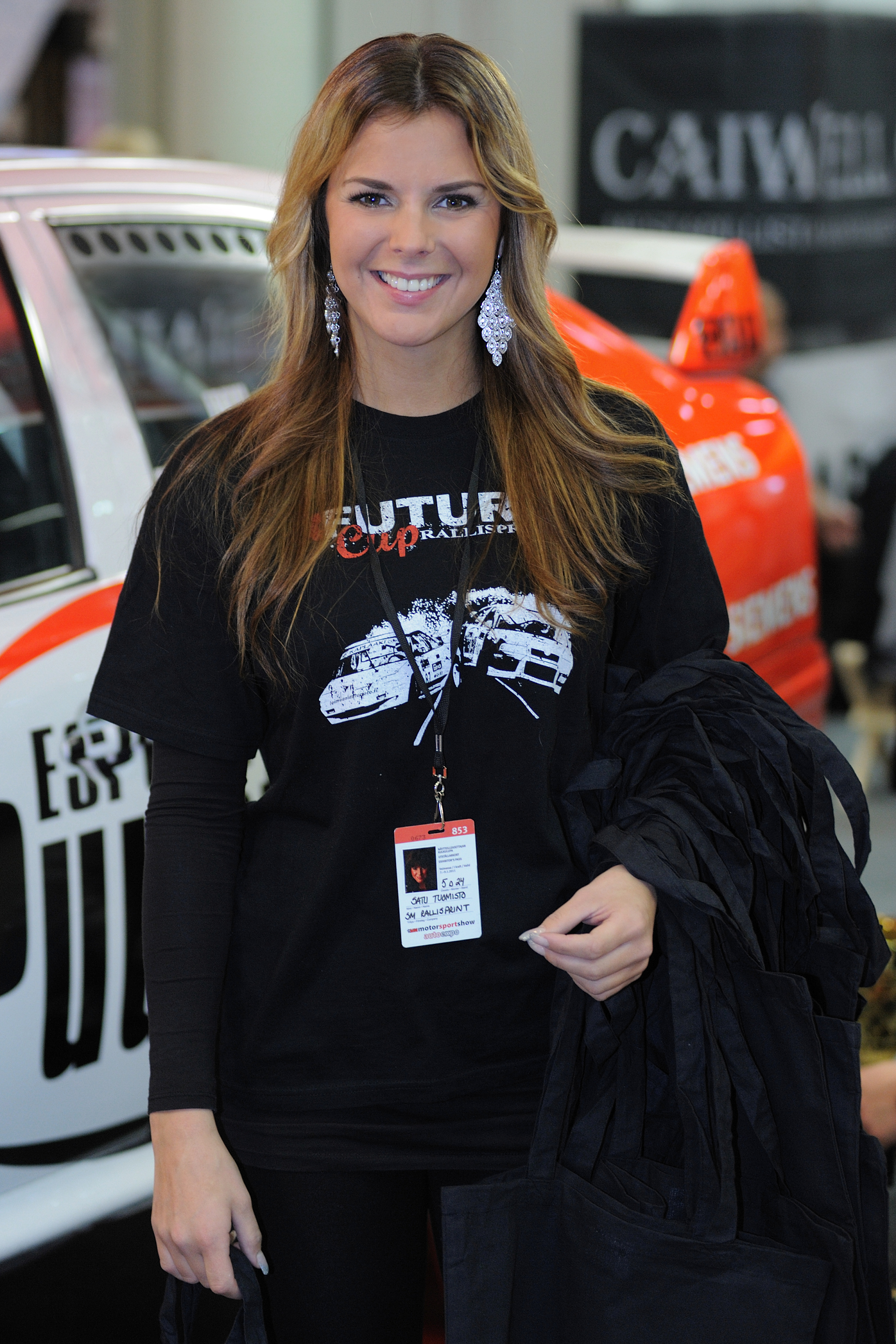 Miss Suomi 2008 Satu Tuomisto VM Motorsport Show:ssa Helsingin Messukeskuksessa.